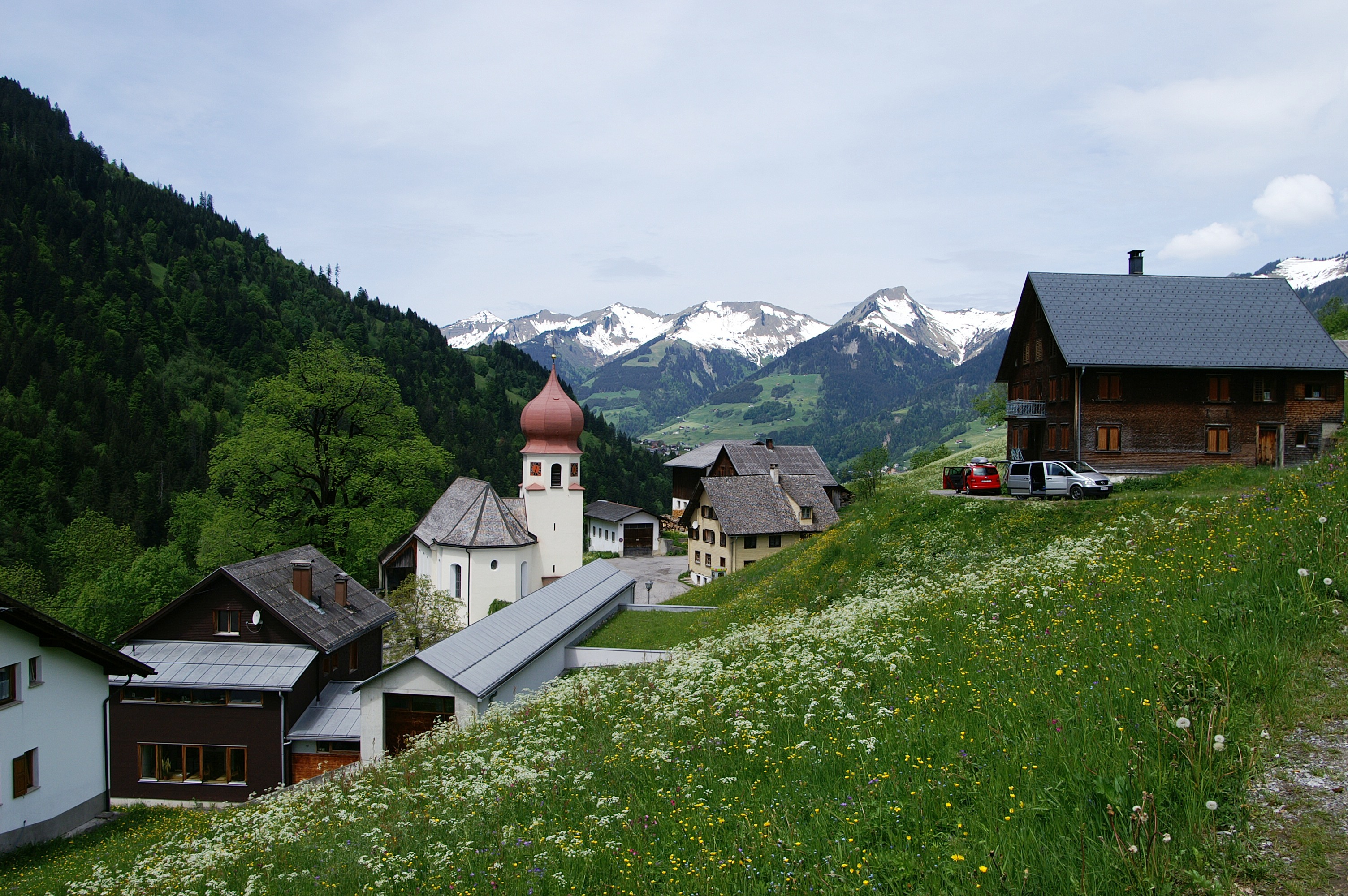 Das Kirchdorf von Marul, einem Bergdorf im grossen Walsertal, in Vorarlberg. Blick auf die Bergspitzen v.l.n.r.: Hüttenkopf 1976m mit Lawinenverbauung, Kuhspitze 1964m, Tälispitze 2000m, Melkspitze 1936m, Falvkopf 1849m